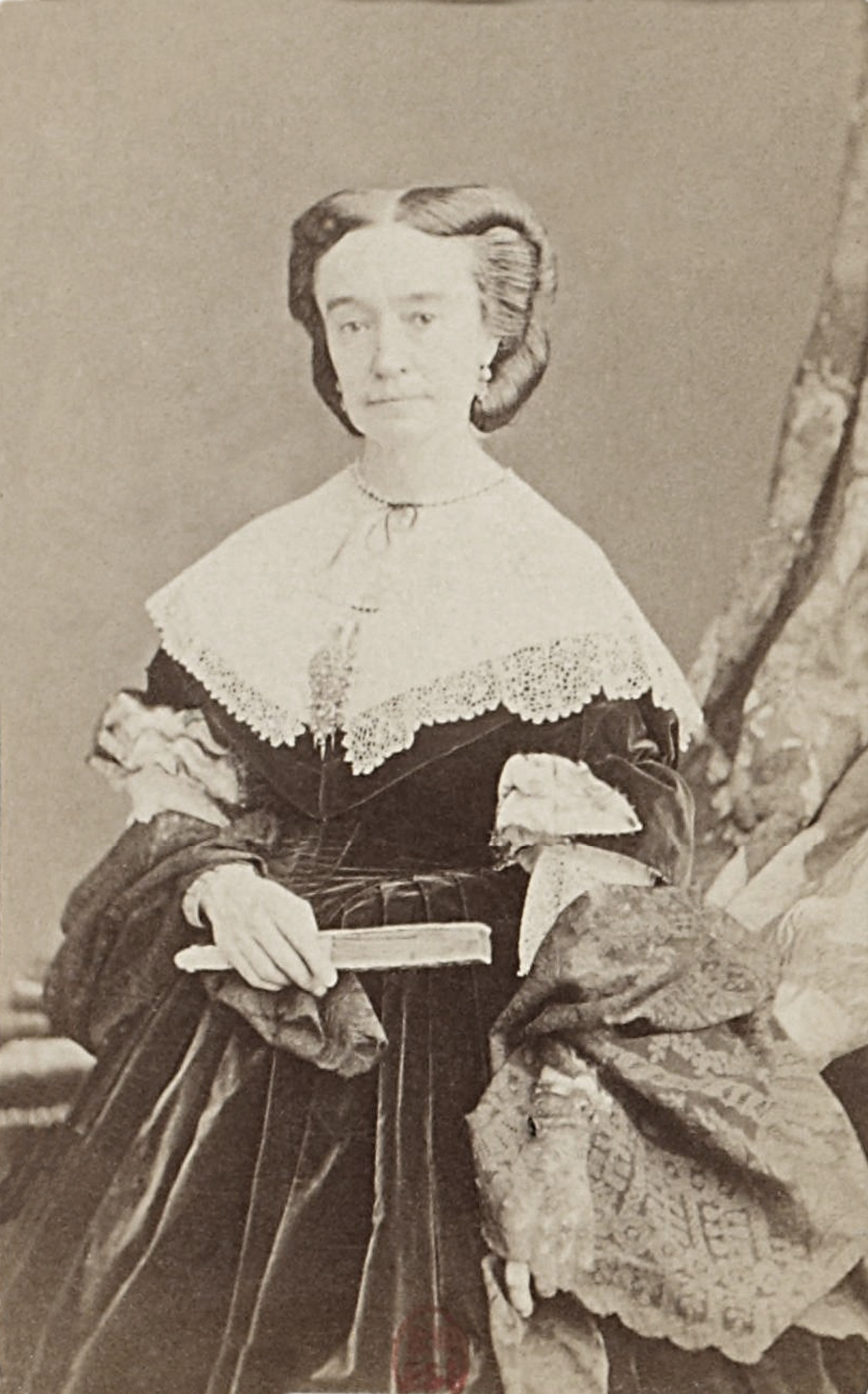 Anaïs Ségalas (1819 - 1895), poétesse, dramaturge et romancière française.